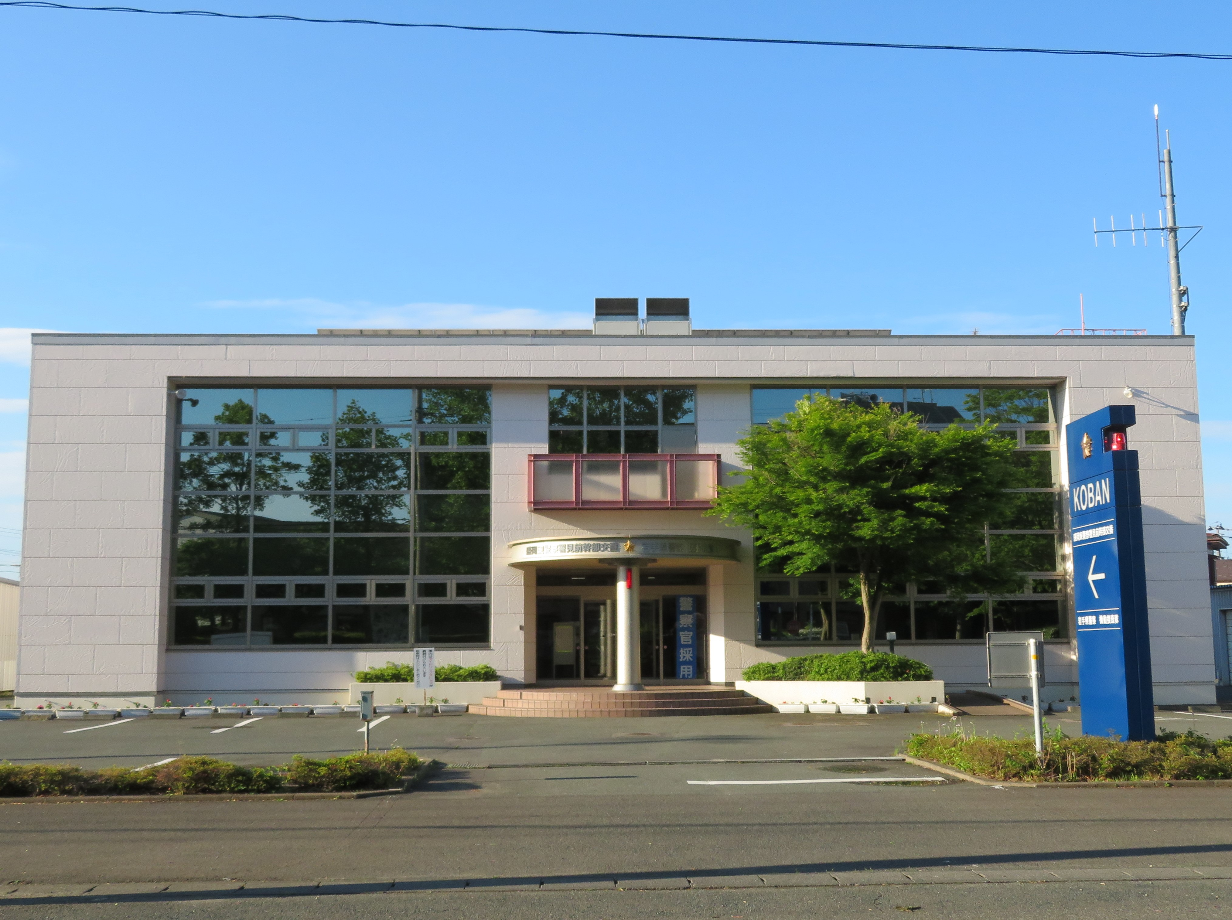 盛岡東警察署見前幹部交番 Canon PowerShot SX720 HS